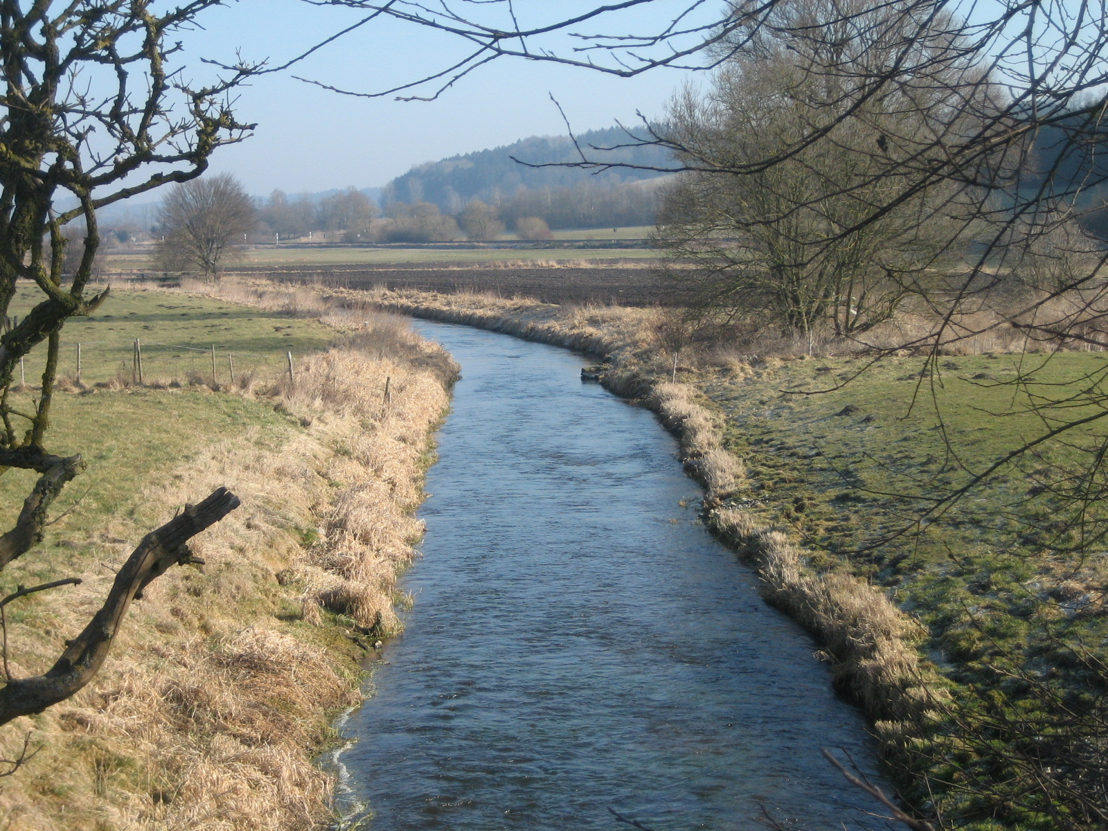 Riß südlich von Biberach